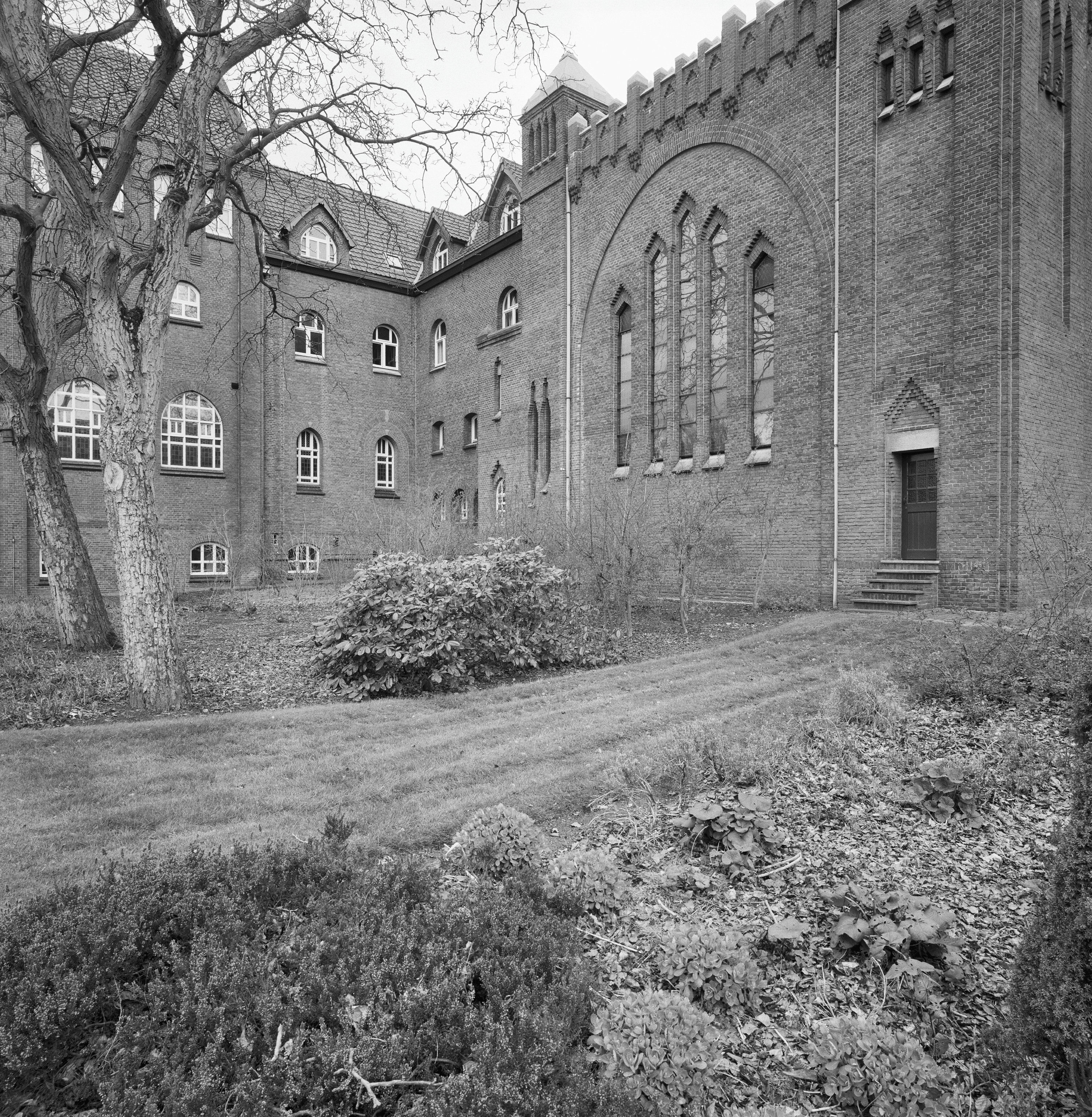 Sint Paulusabdij: Overzicht